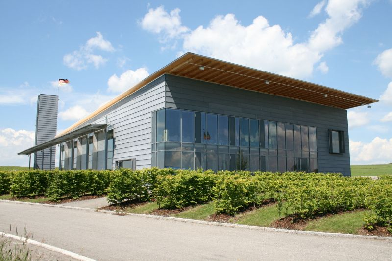 Feuerwehrhaus